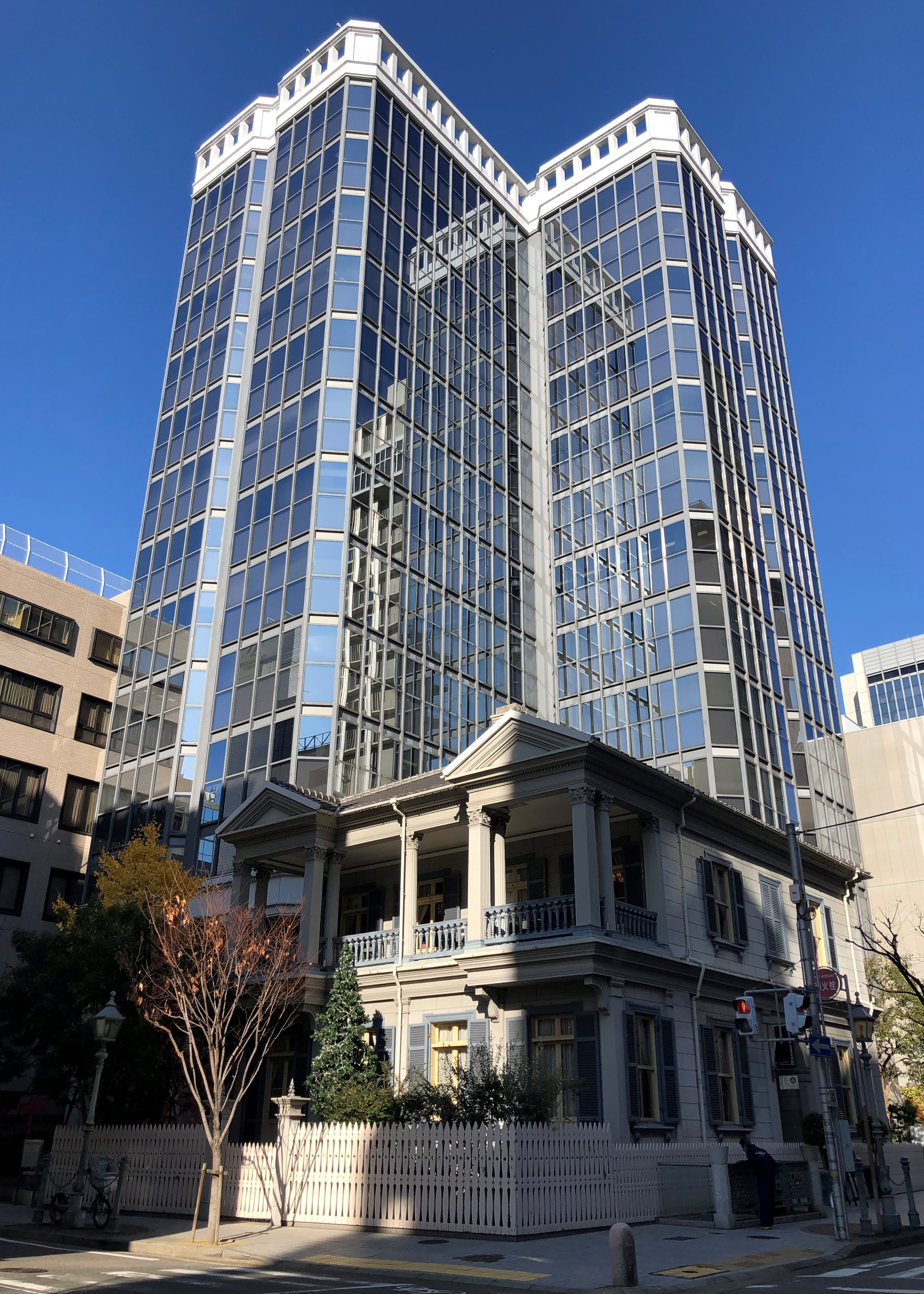 神戸市の15番館ビル